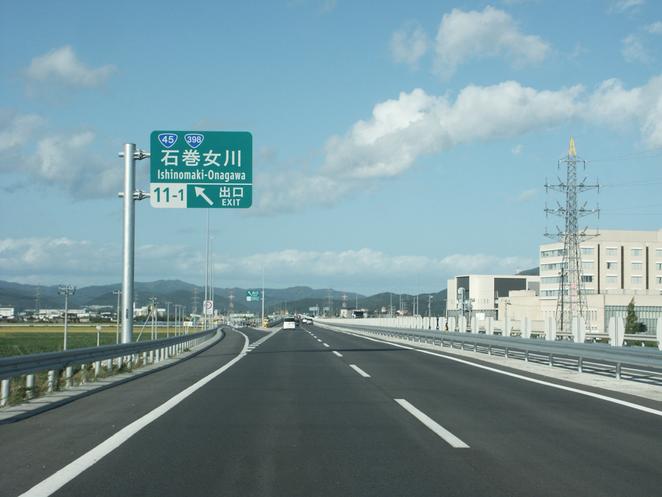 三陸自動車道石巻女川IC 出口付近（利府JCT方面側）